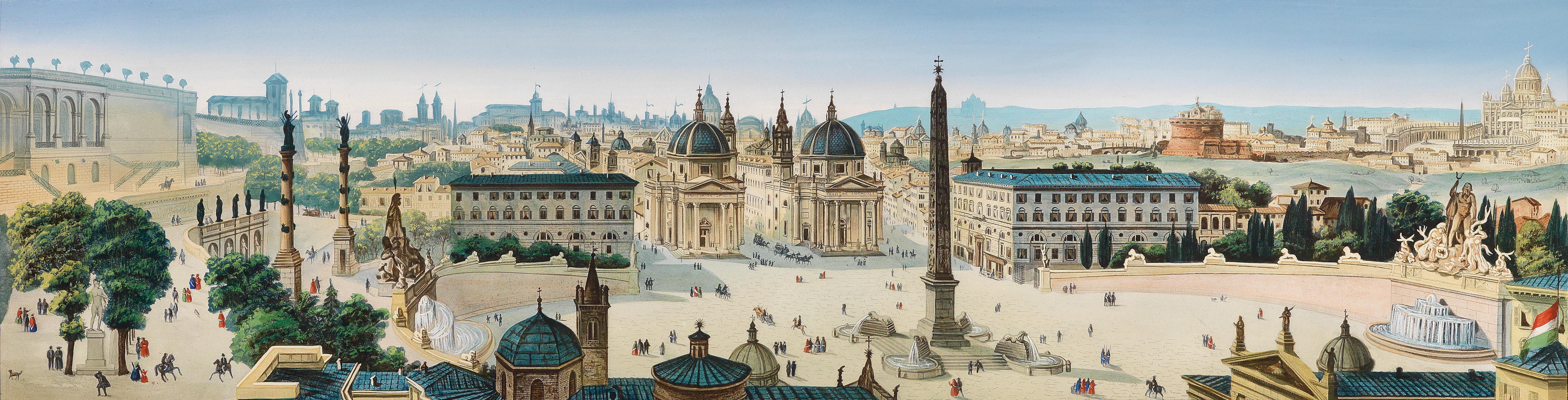 Panorama von Rom: Piazza del Popolo, St. Peter, Pincio, betitelt und in Goldschrift bezeichnet "Roma, Calvi, Milano", Aquarell und Gouache über Aquatinta, 38 x 105 cm, gerahmt